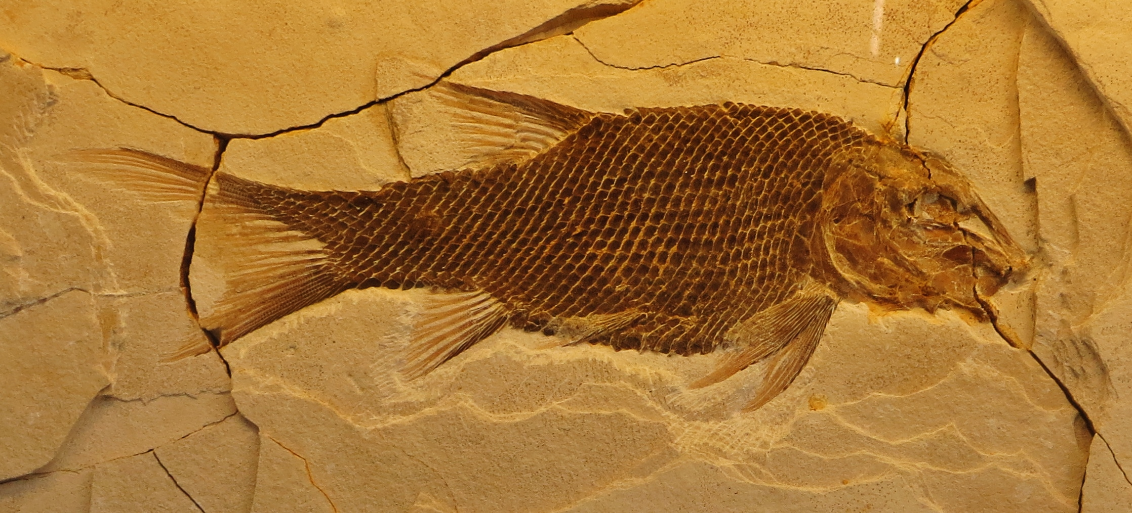 Took the picture at Jura-Museum, Eichstaett